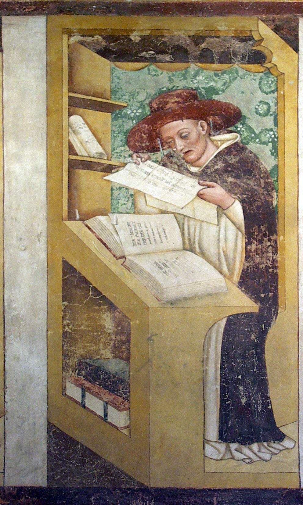 Matteo Orsini, serie dei Quaranta domenicani illustri, ex convento di San Niccolò, Sala del Capitolo, Treviso, 1352 (altezza di ciascun ritratto 150 cm circa)